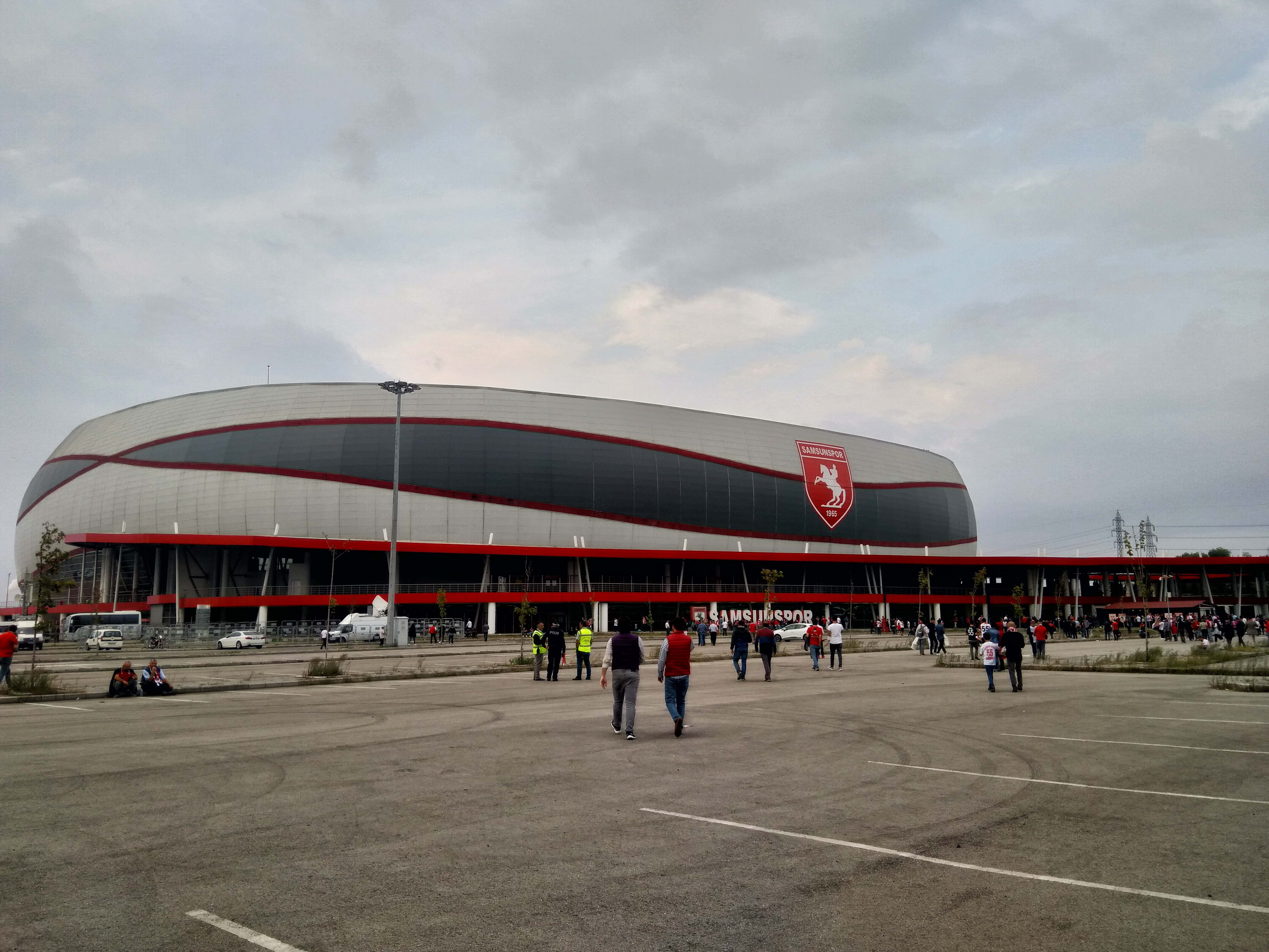 Ekim 2019 itibarıyla Samsun 19 Mayıs Stadyumu'nun güneybatı cephesinden görünümü.